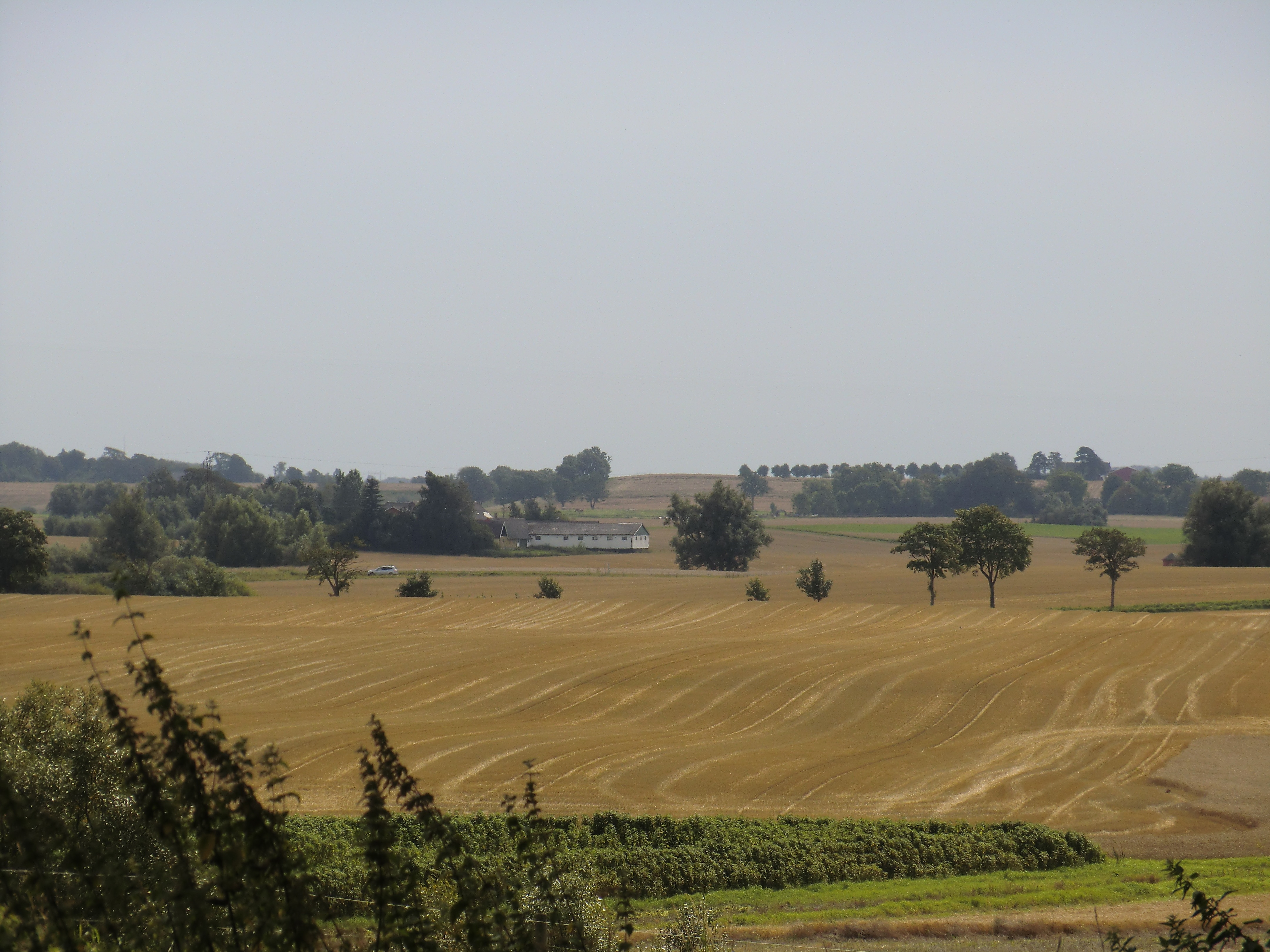 Vy över Särslövs socken mot söder från Görslövs kyrka. Gården på bilden är Särslöv 9:2.